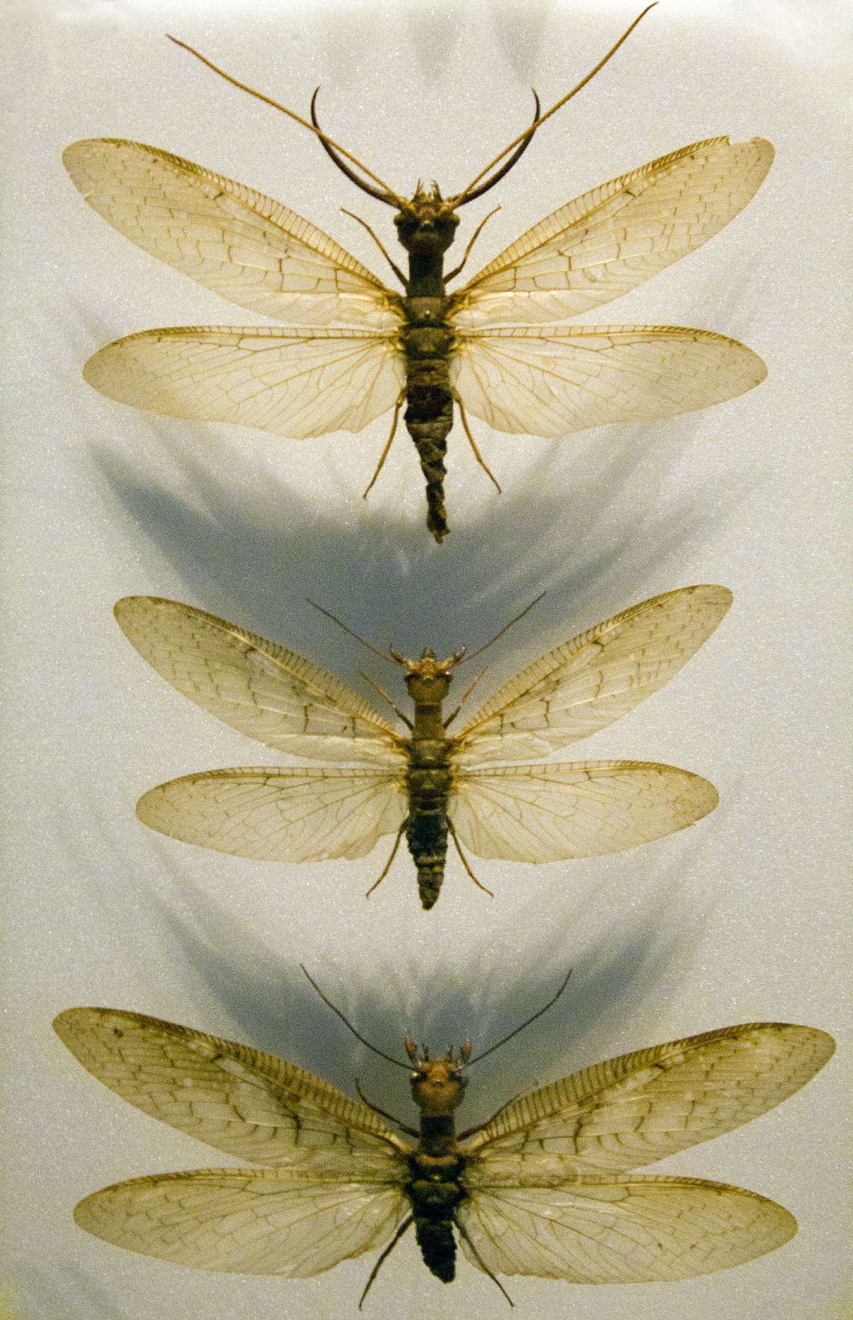 Trois mégaloptères du Muséum d'histoire naturelle de Toulouse